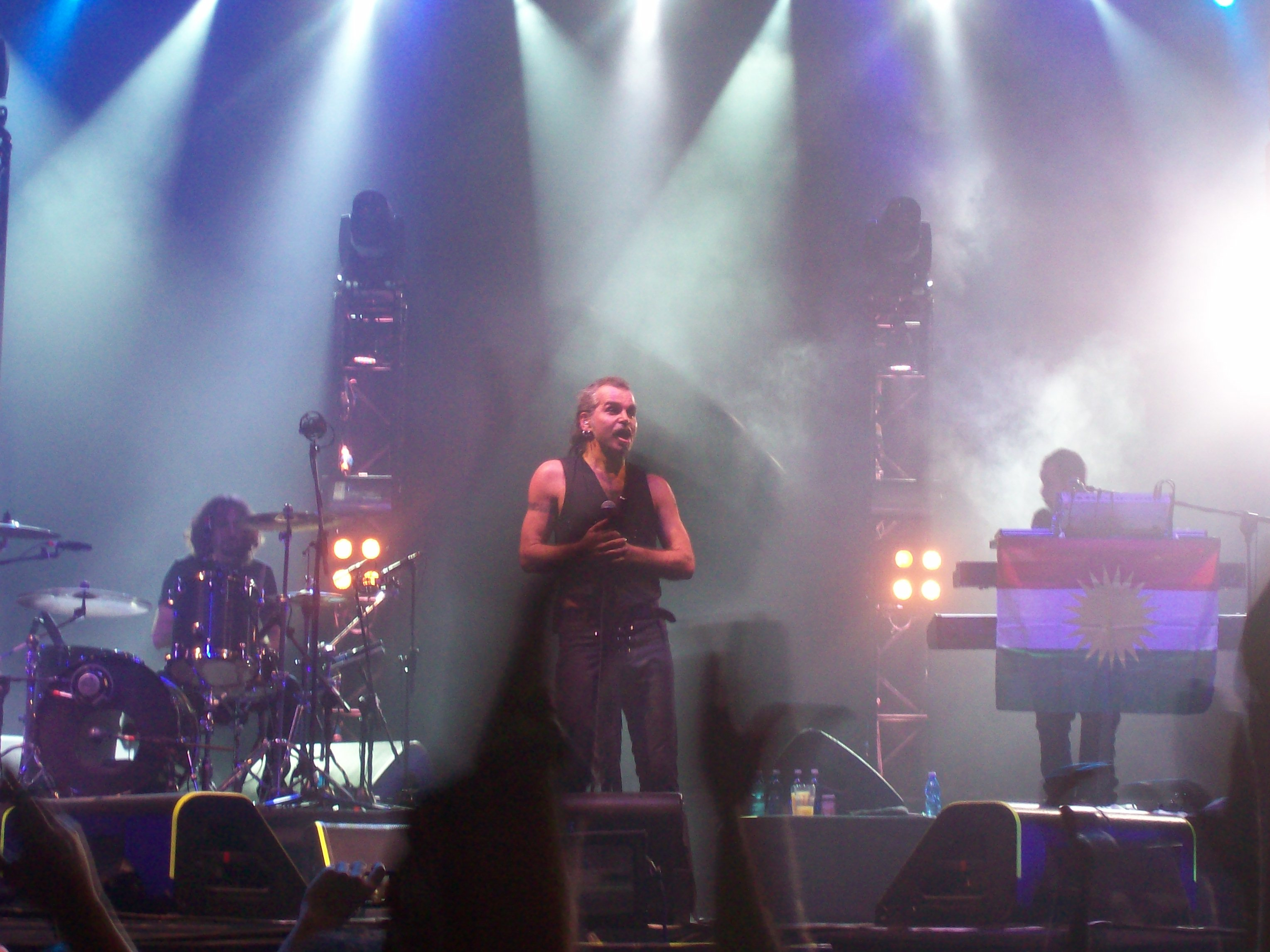 Litfiba in Concerto al Palatorino di Torino, data del 20-11-2010.